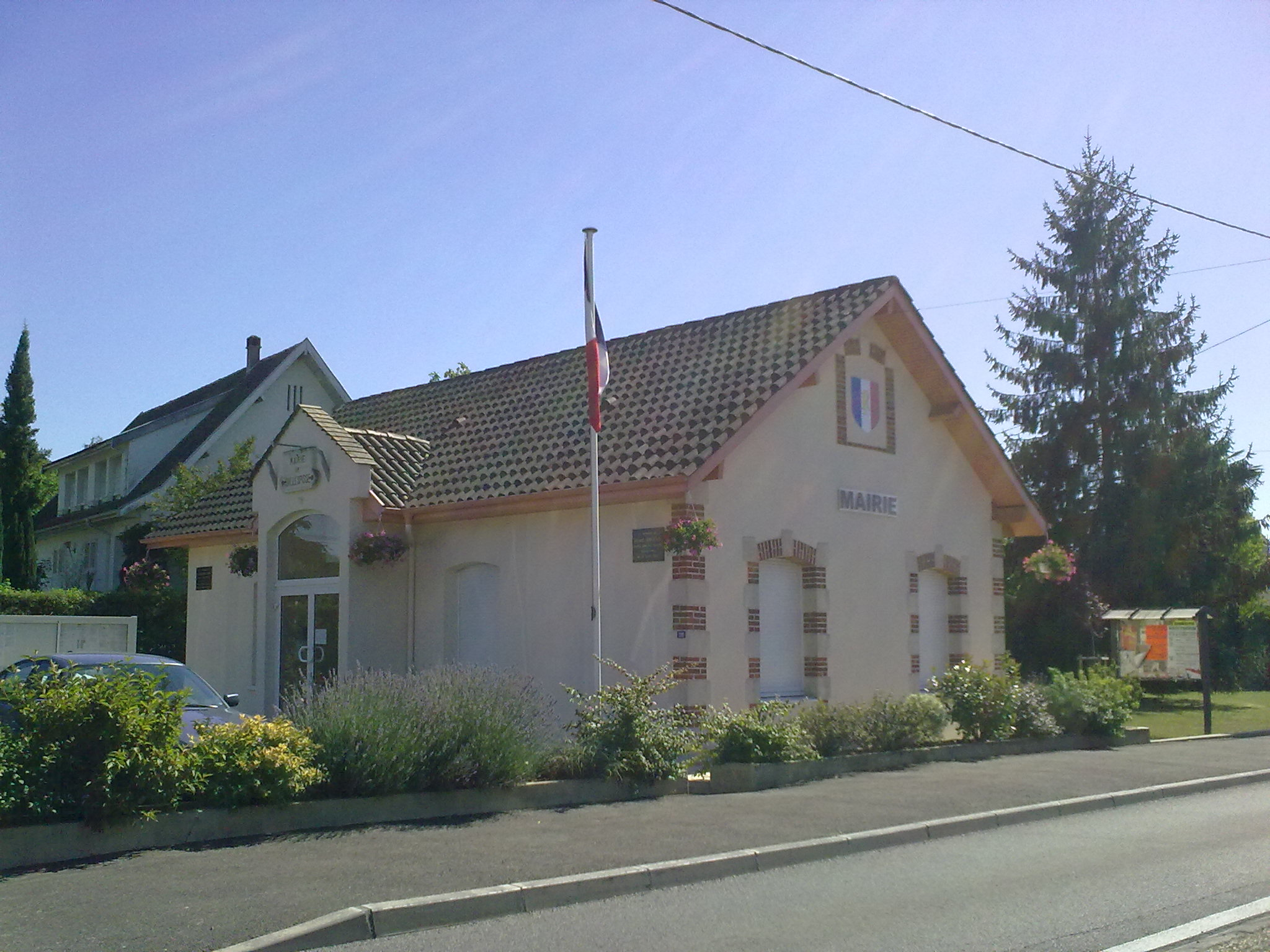 Sallespisse le 18 juillet 2010, France.